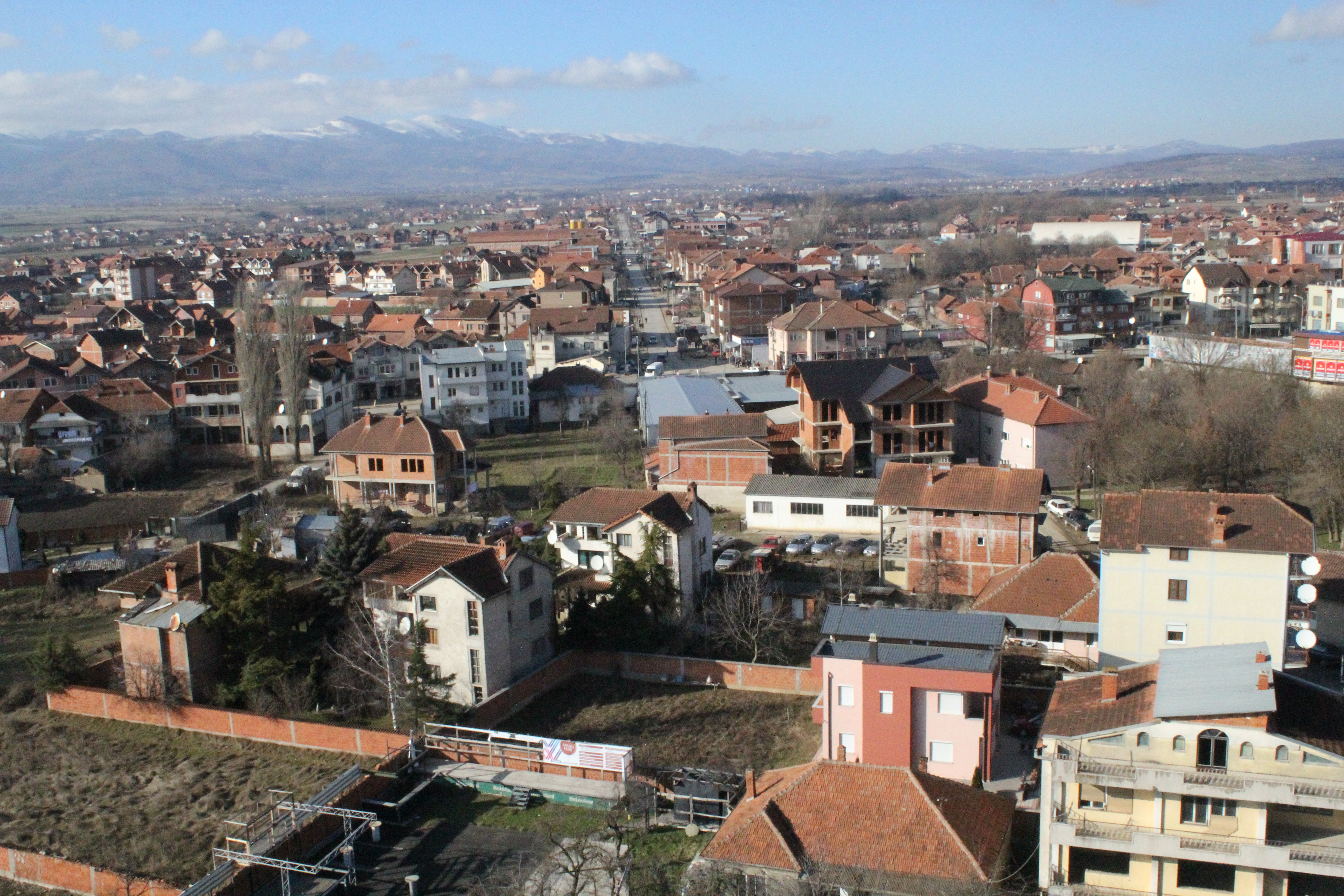 Pamje nga Xhamia 4